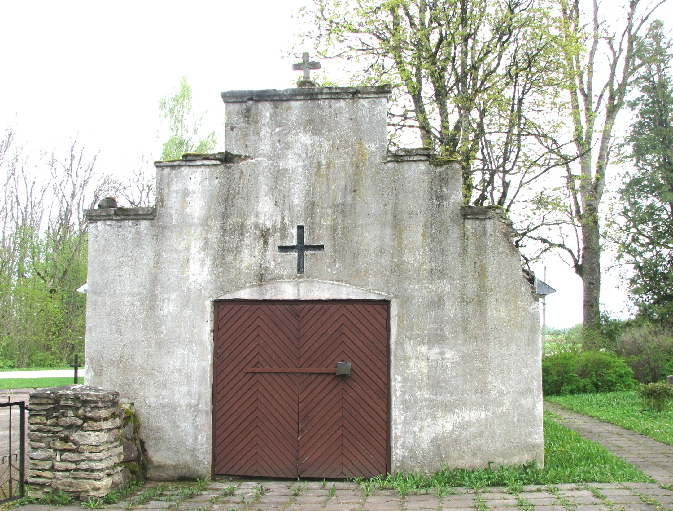 Lääne-Nigula kabel on krohvitud paekiviseintega põhiplaanilt ristkülikukujuline (7,5 x 4,5m) ja plekk-katusega hoone sissepääsu ja akendega põhja- ning lääneküljes. Otsaseinad ülalt astmeliselt kitsenevad.